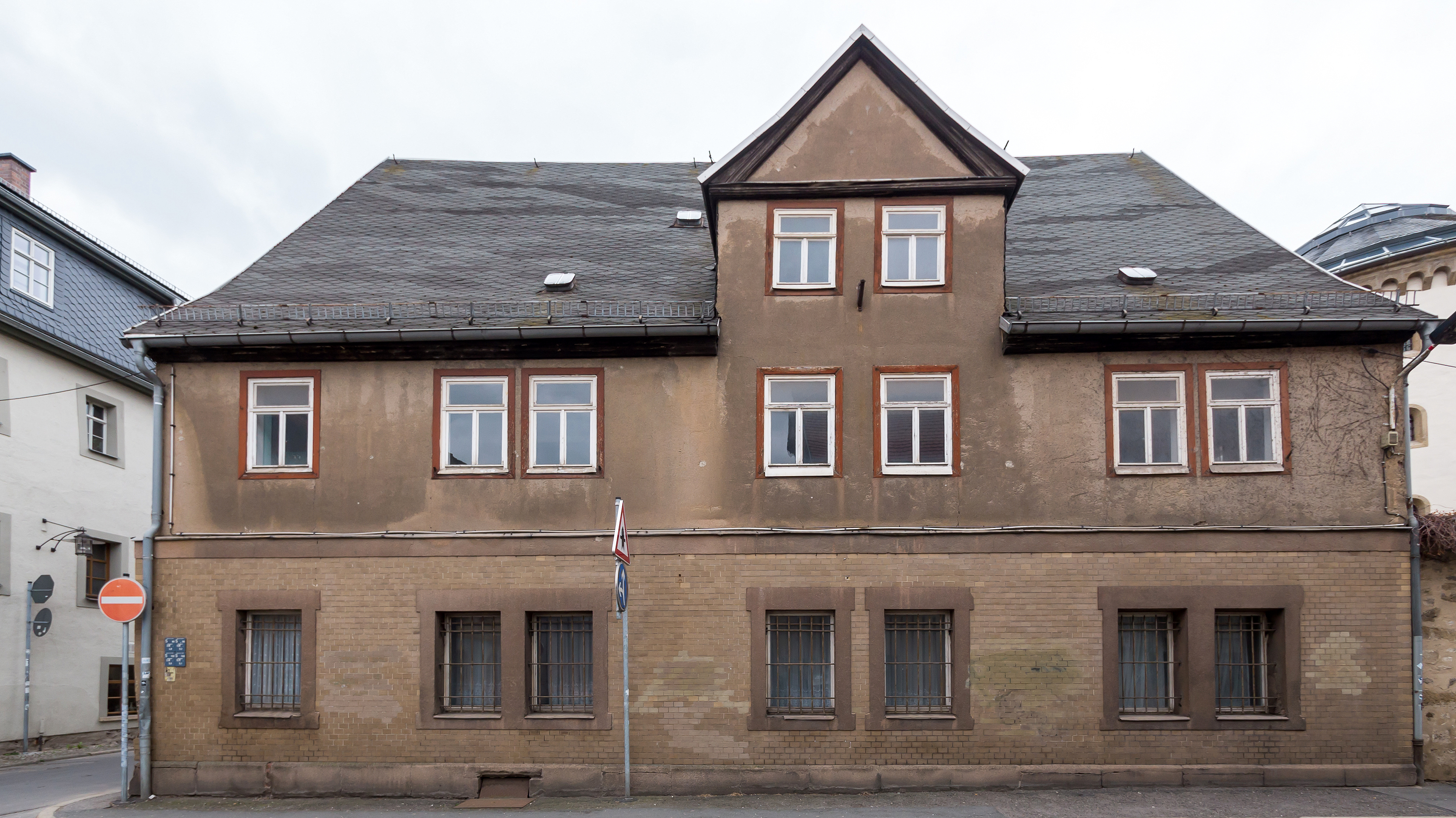 Saalfeld Johannisgasse 5 II